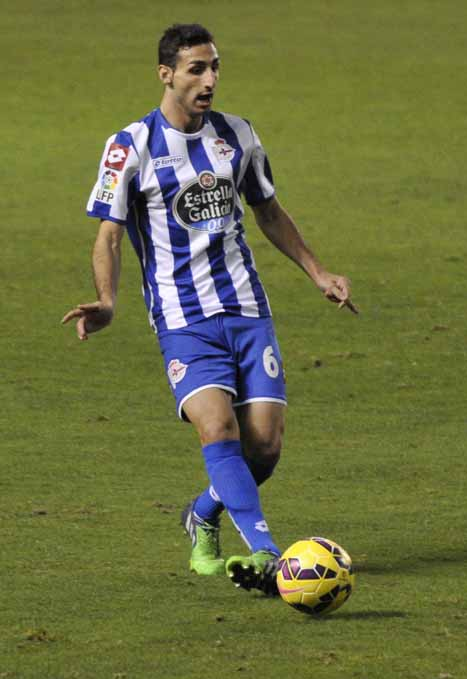 José Rodríguez 6 Pedro 7